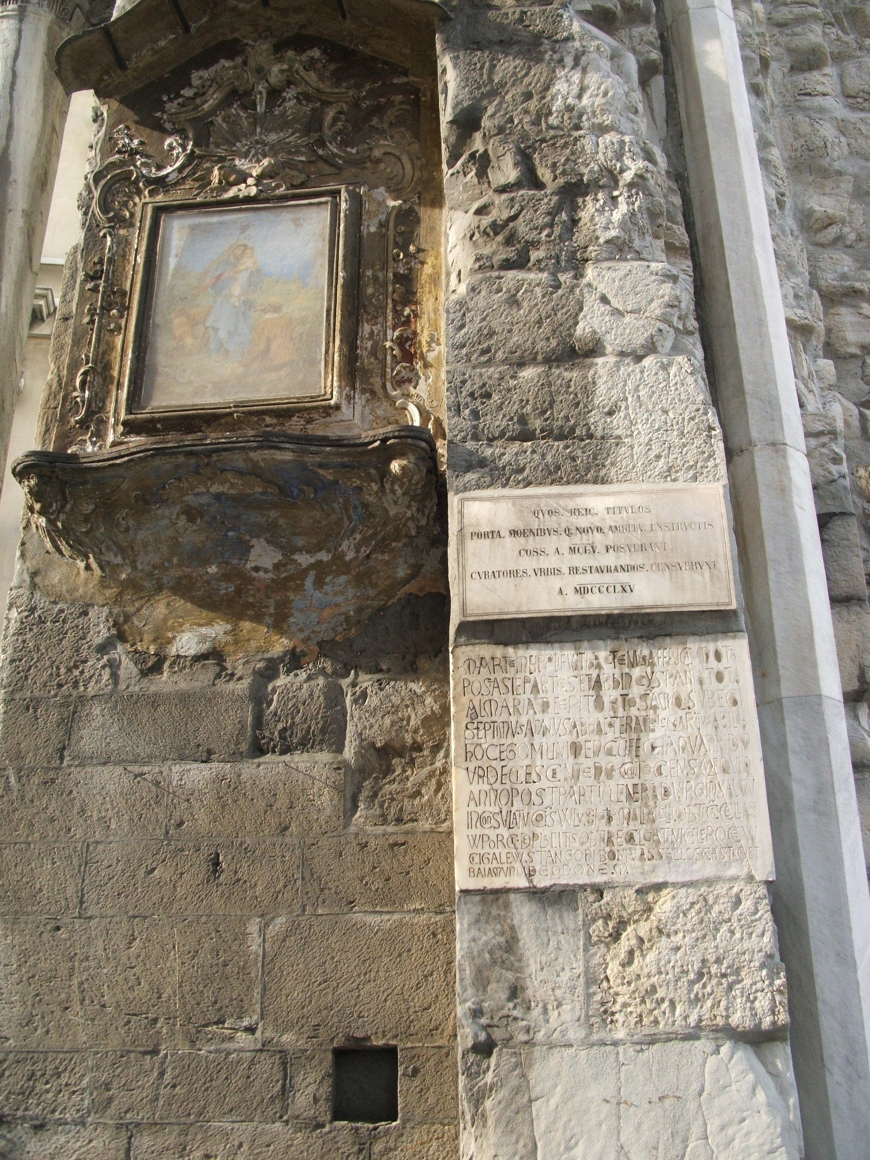 Genova, Piano di Sant'Andrea, la Porta Soprana, inscrizione